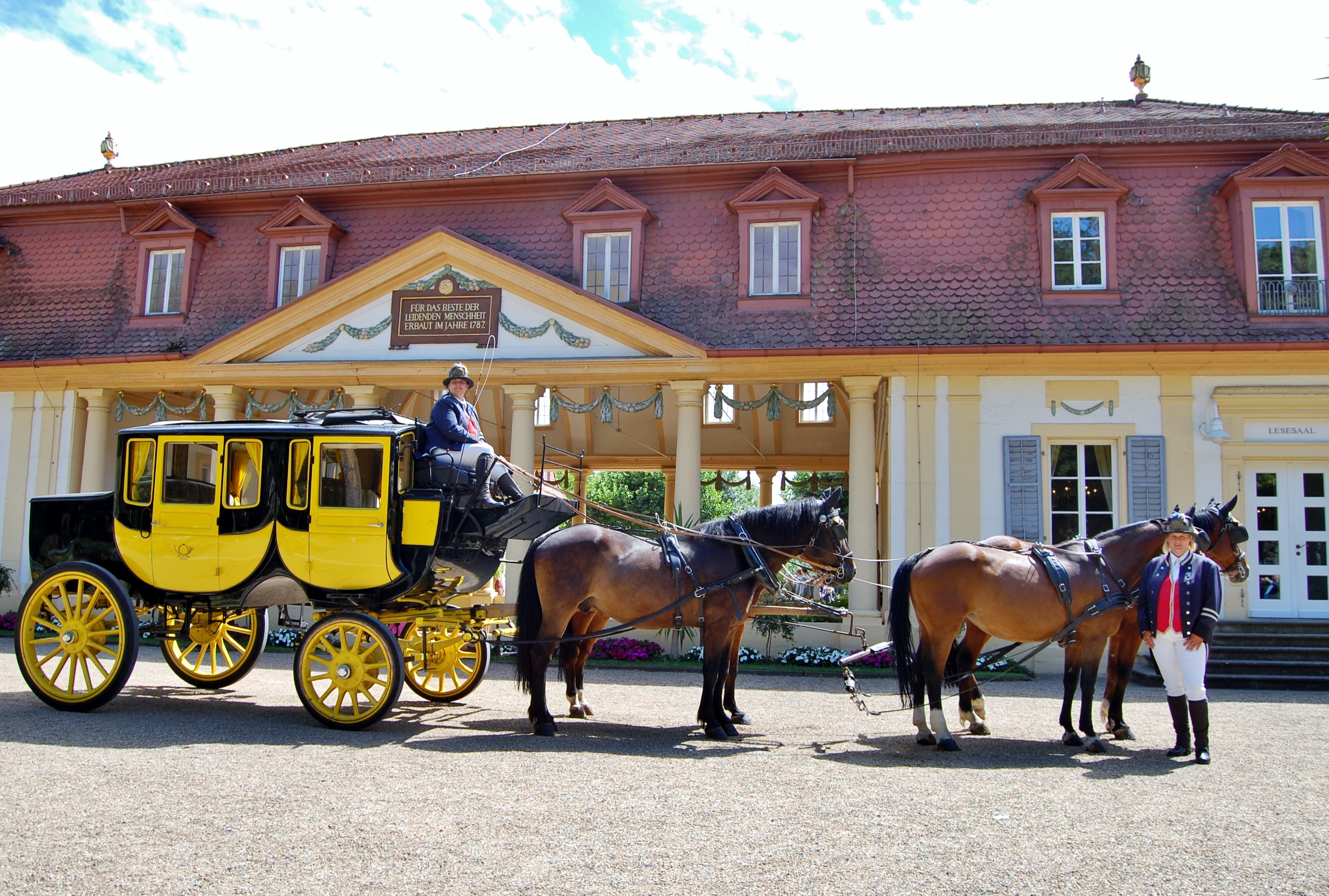 Die Bad Kissinger Postkutsche vor dem Brunnenbau in Bad Bocklet